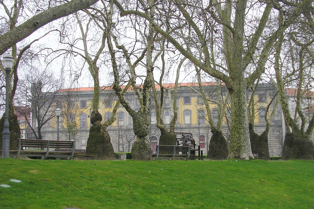 "João Chagas" (or "Cordoaria") garden with "Cadeia da Relação" in the background, in Porto, Portugal